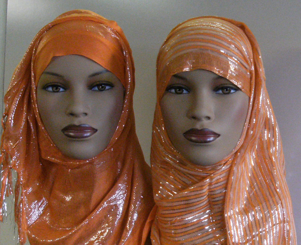 скромная одежда для muslims и non-muslims